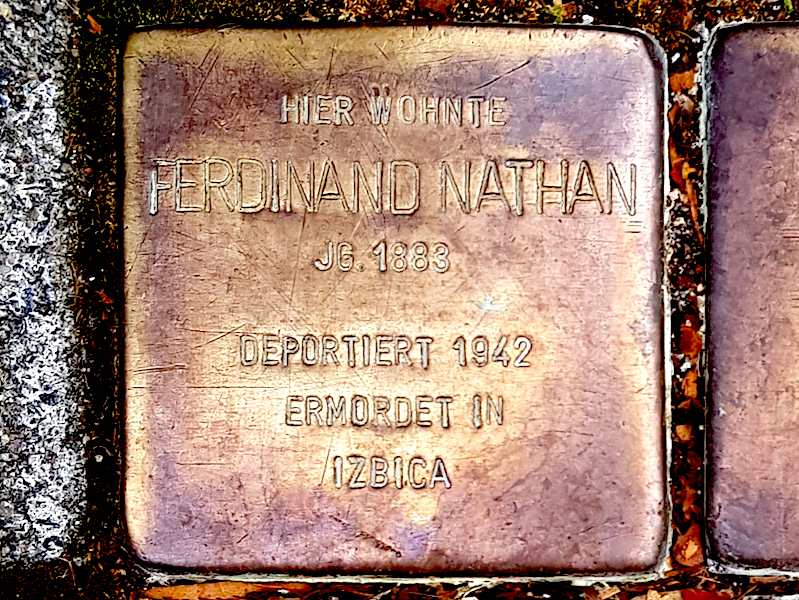 Stolperstein für Ferdinand Nathan, Lerchenstr. 25, Duisburg-Neudorf